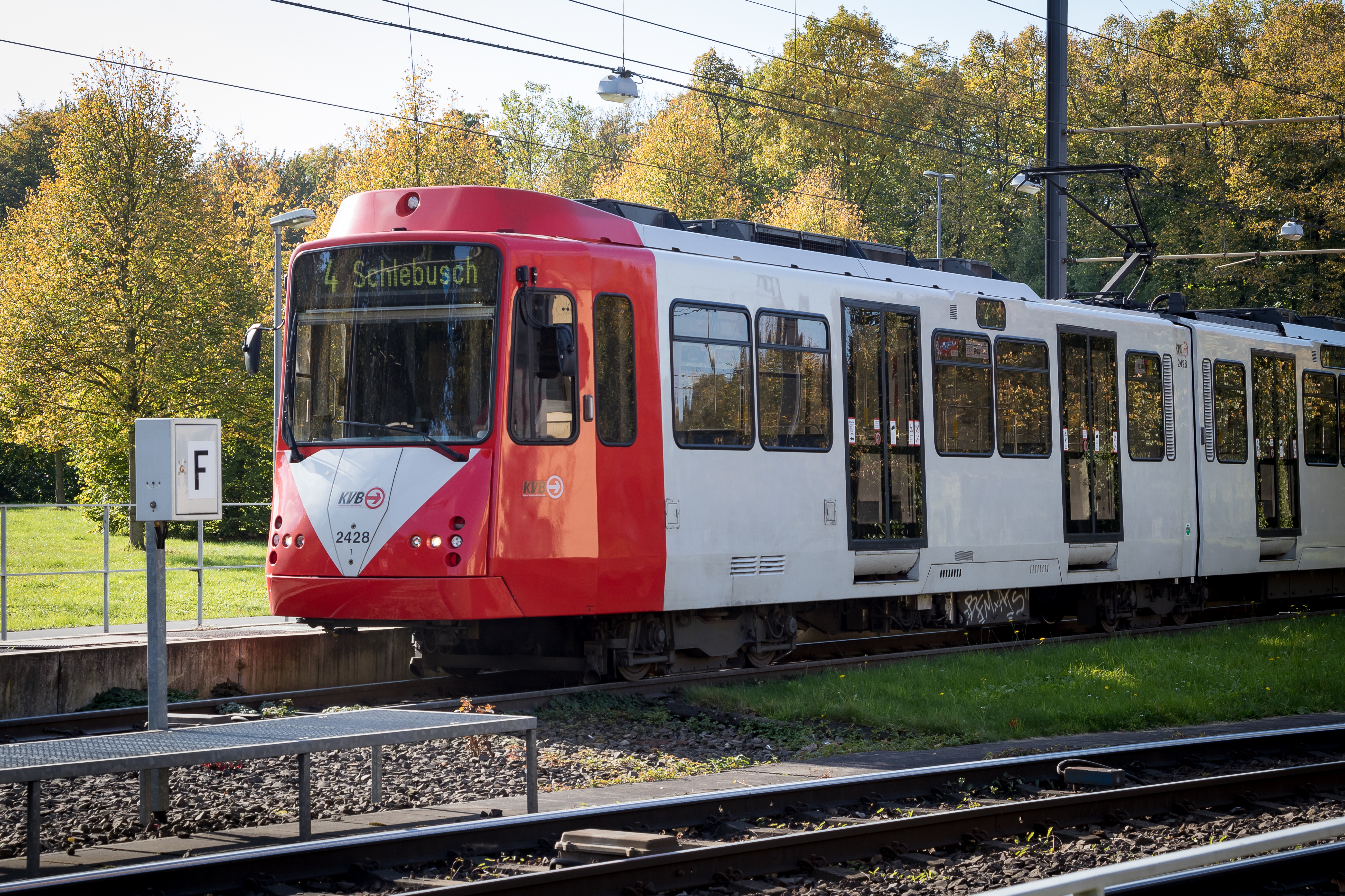 Erneuerter Stadtbahnwagen B in Köln, Endhaltestelle Linie 4 Bocklemünd